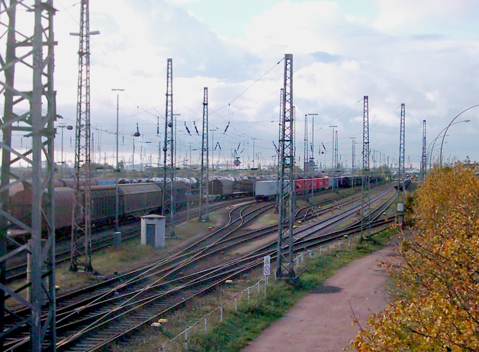 Hafenbahnhof Hamburg Süd zwischen Spreehafen und Veddeler Damm. Blick nach Westen.